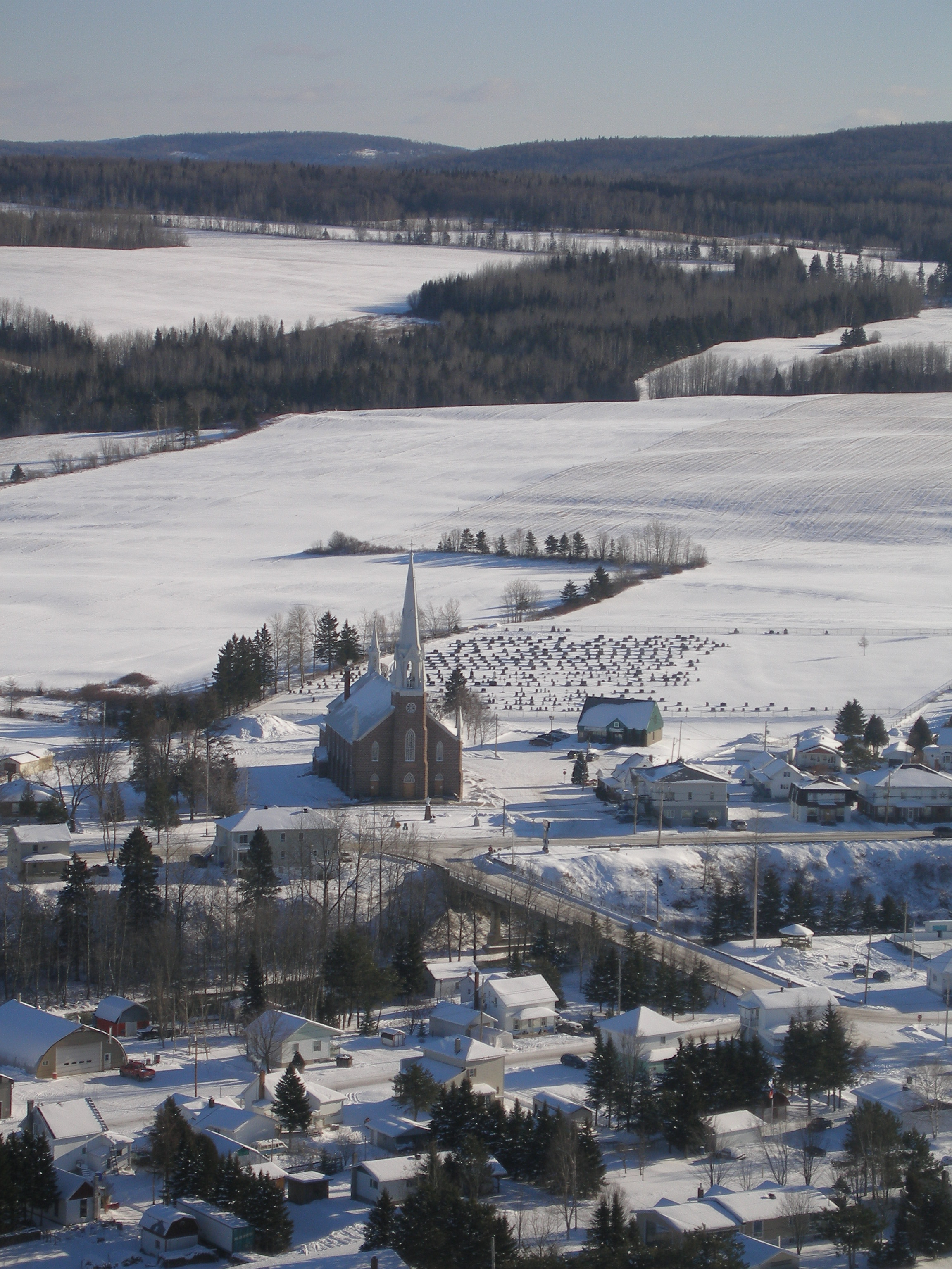 Village de St-Léon-le-Grand(Bas-St-Laurent)